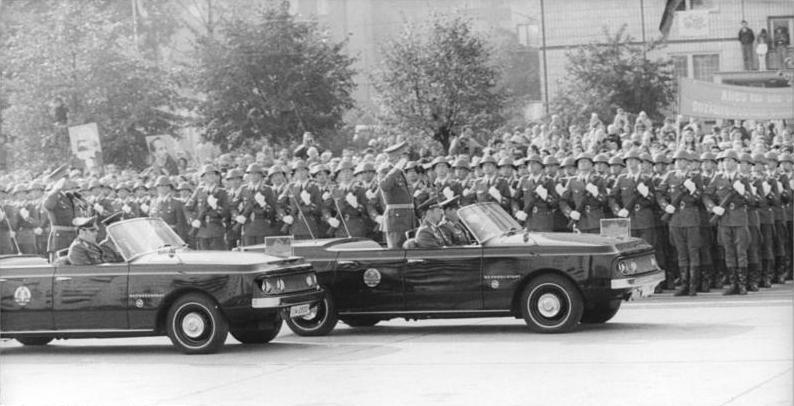 Berlin, 25. Jahrestag DDR-Gründung, Parade ADN-ZB Spremberg 7.10.74 Berlin: 25. Jahrestag – Ehrenparade der Nationalen Volksarmee auf der Karl-Marx-Allee. Information added by Wikimedia users.